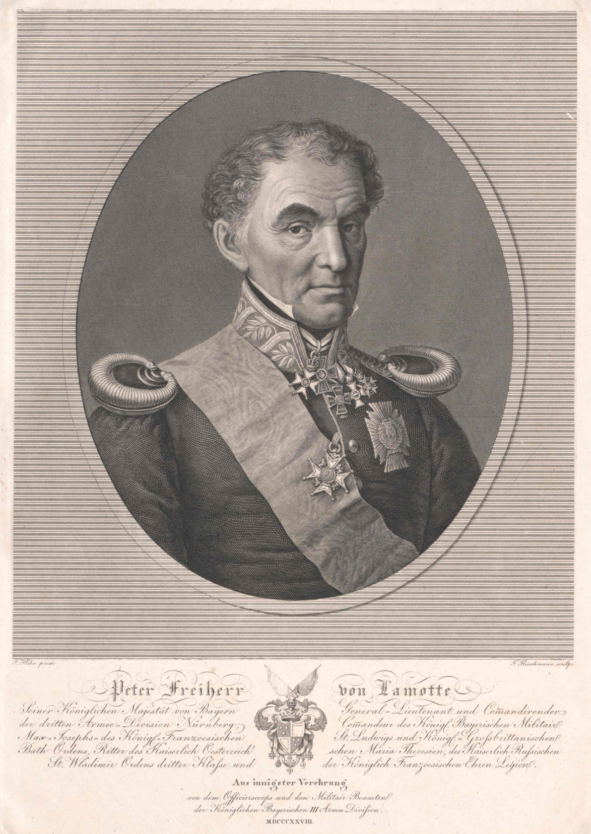 image